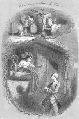 Illustration of Au clair de la lune, a traditional French song